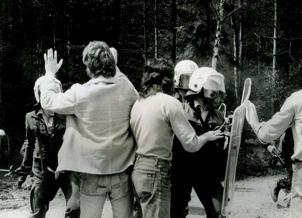 Widerstand der Atomkraftgegner gegen den Bau der Wiederaufarbeitungsanlage Wackersdorf (WAA) in den 1980er Jahren.